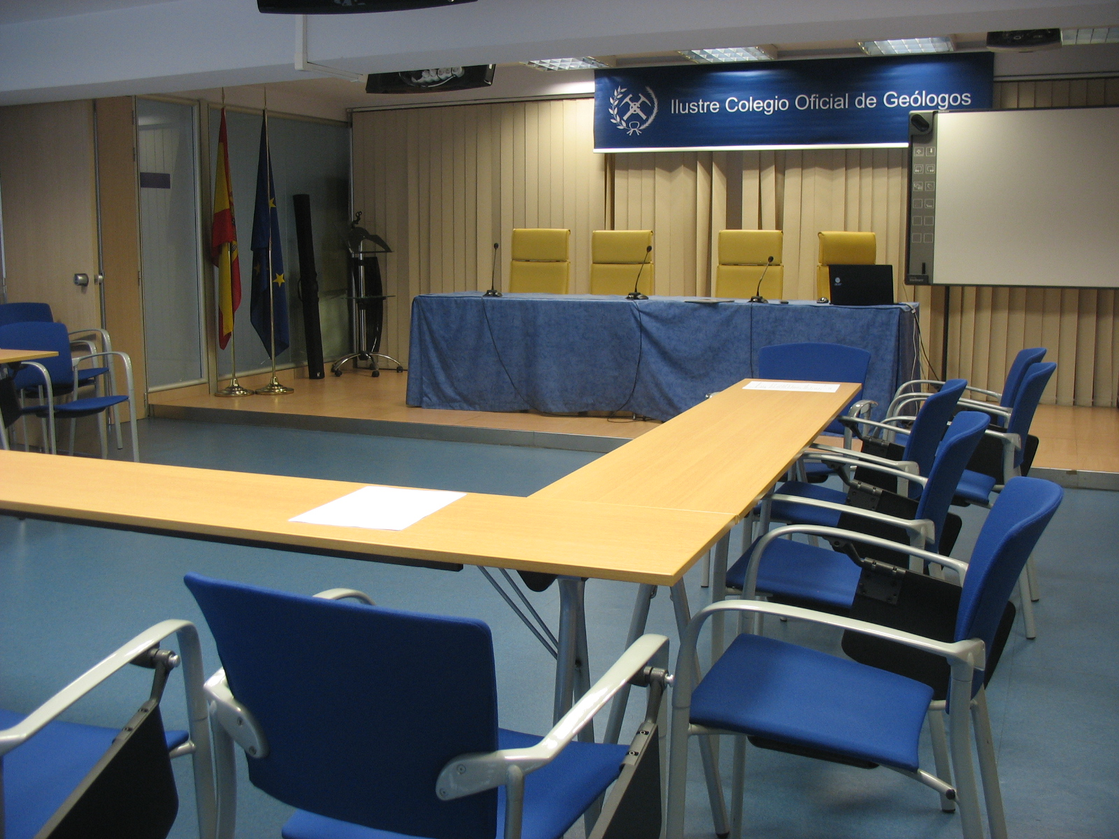 Salón de actos en la sede del Ilustre Colegio Oficial de Geólogos. Calle de Raquel Meller, 7 (Local), Madrid, España.